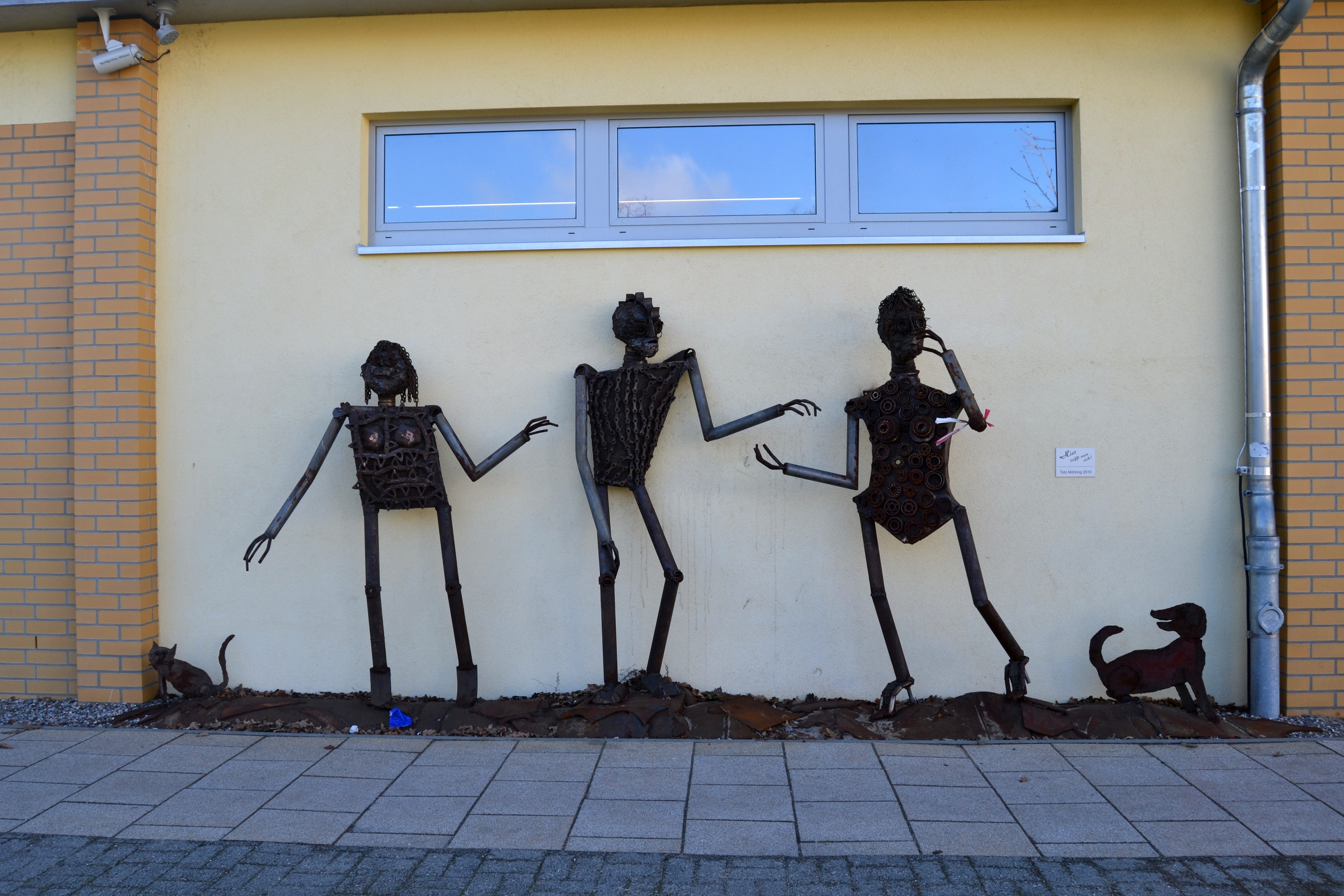 Kunstwerk "Hier trifft man sich" von Tobi Möhring und Joachim Tilsch aus dem Jahr 2010 am Edeka-Markt in Schöneiche bei Berlin